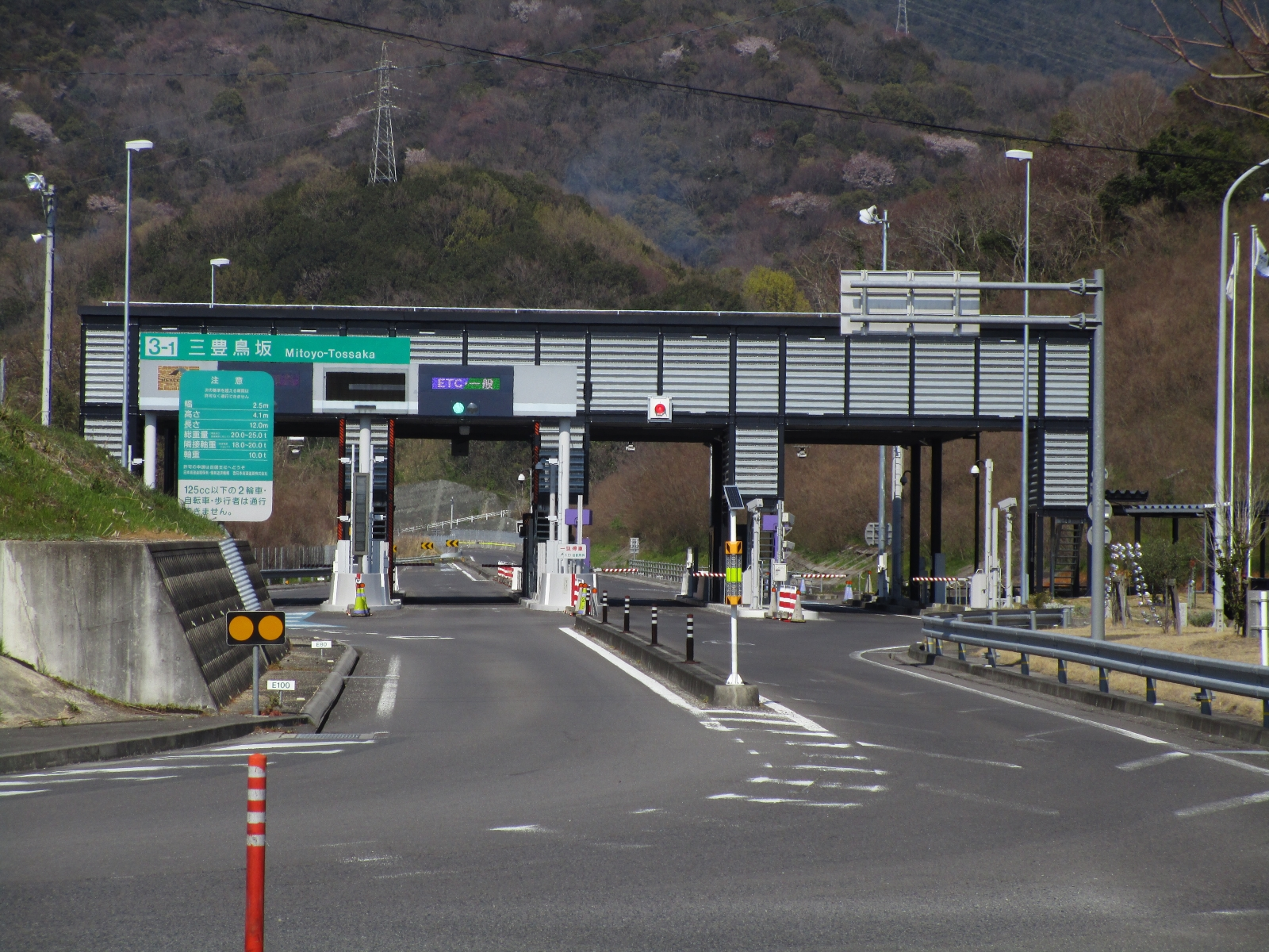 三豊鳥坂インターチェンジ料金所